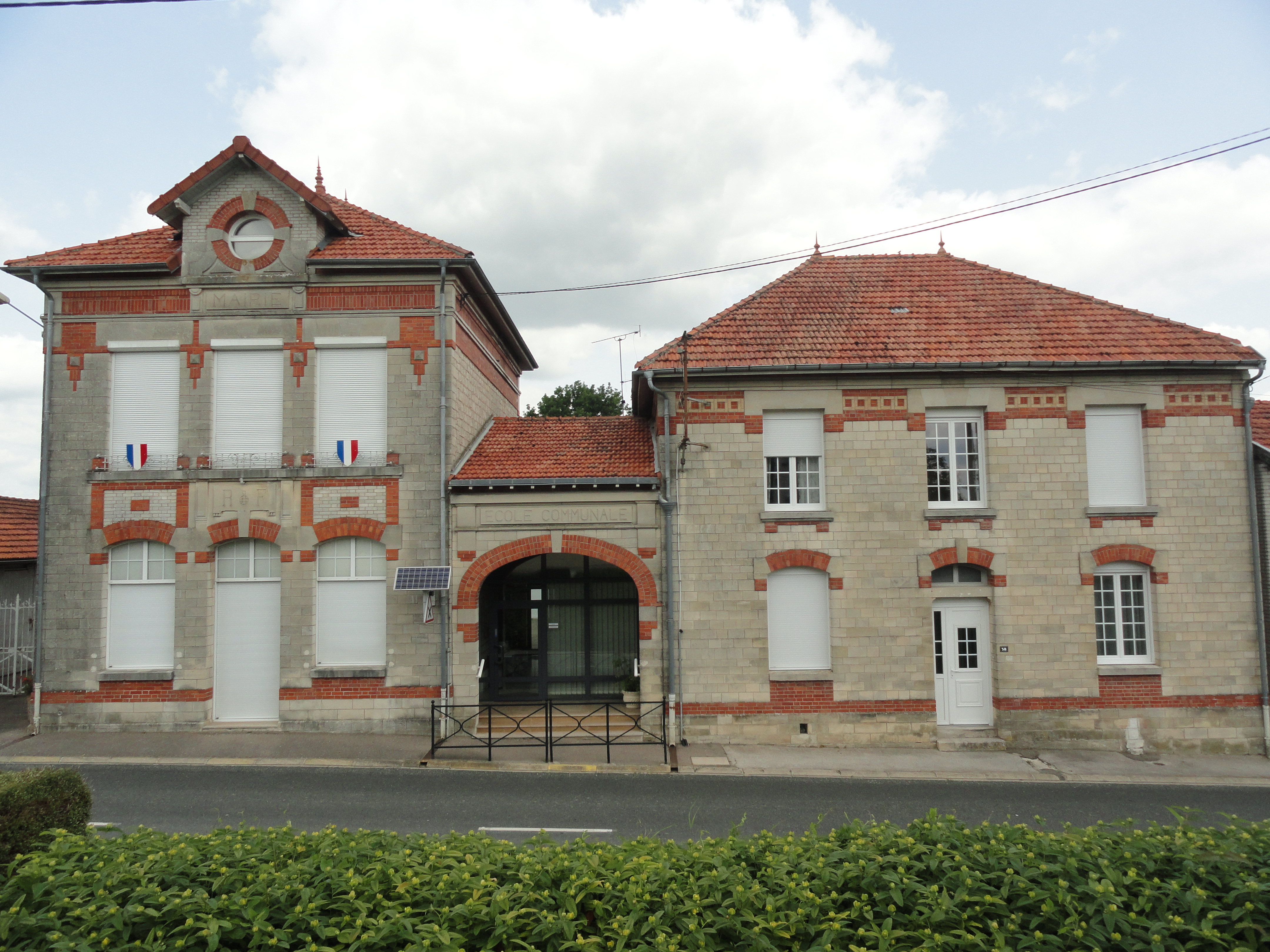 La mairie de Huiron (51).